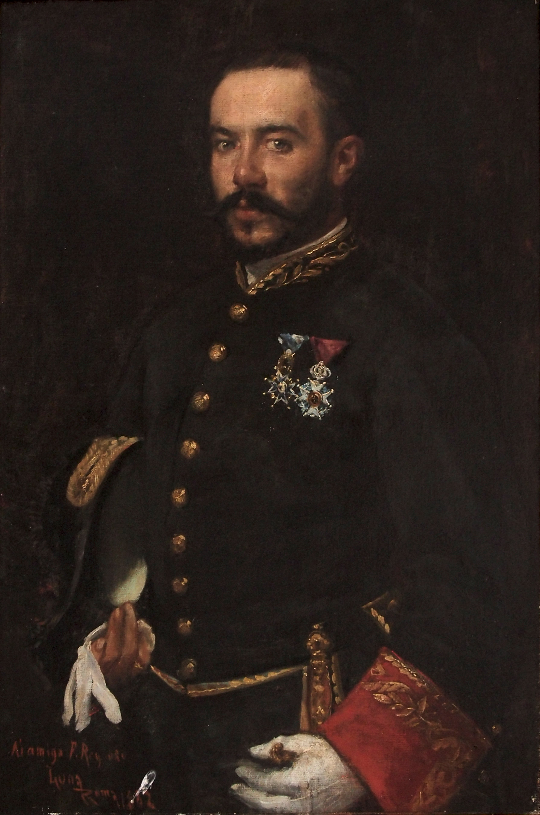 Retrato del diplomático y escritor español Francisco de Reynoso y Mateo. Este retrato fue pintado en Roma en 1882 por el pintor Juan Luna Novicio.